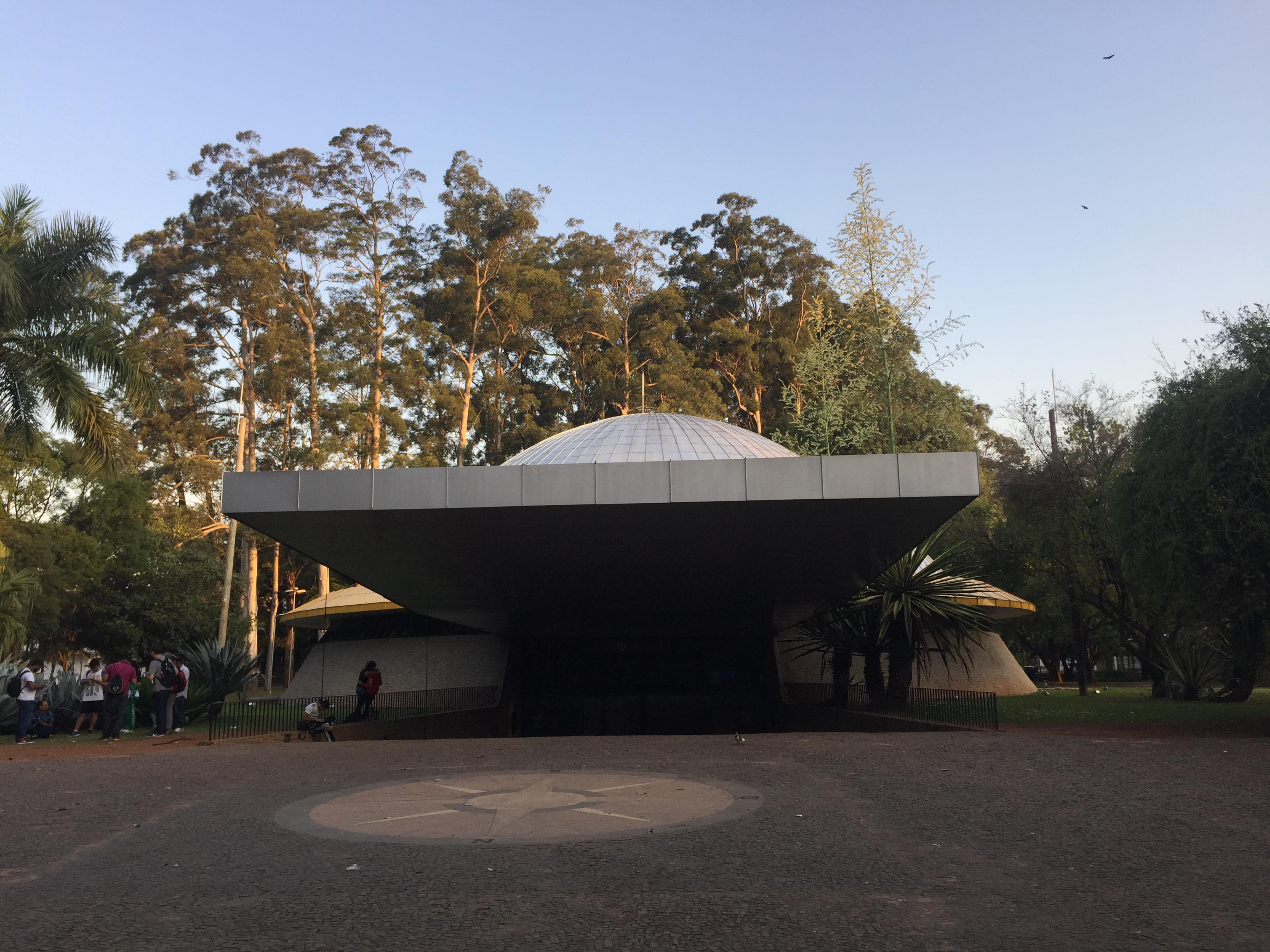 Fachada do Planetário Prof. Aristóteles Orsini situado no Parque do Ibirapuera, São Paulo (SP), Brasil